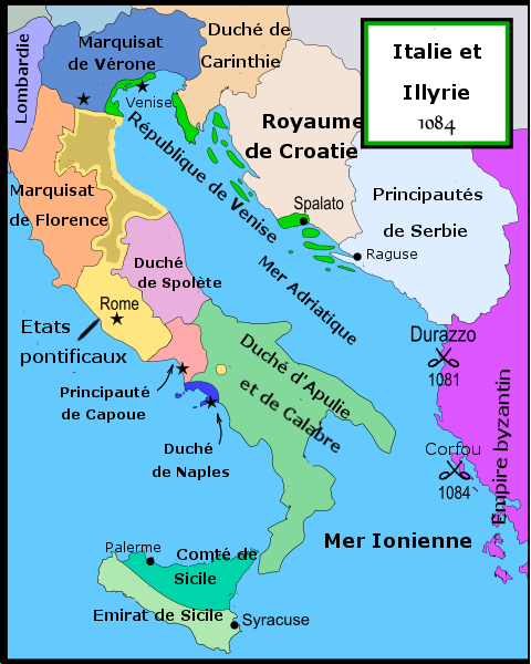 Situation de l'Italie et de l'Illyrie vers 1085